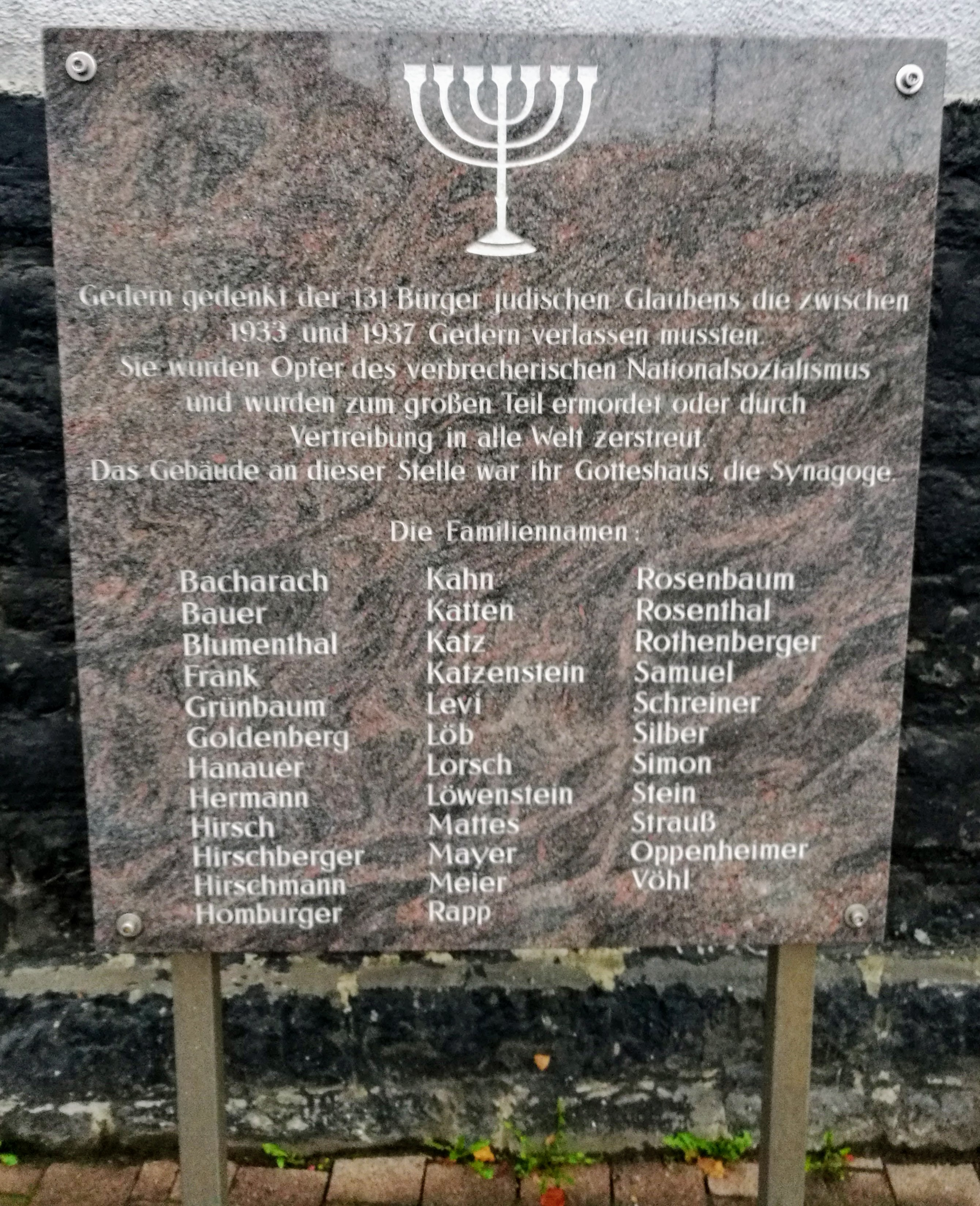 Gedenktafel vor der ehemaligen Gederner Synagoge